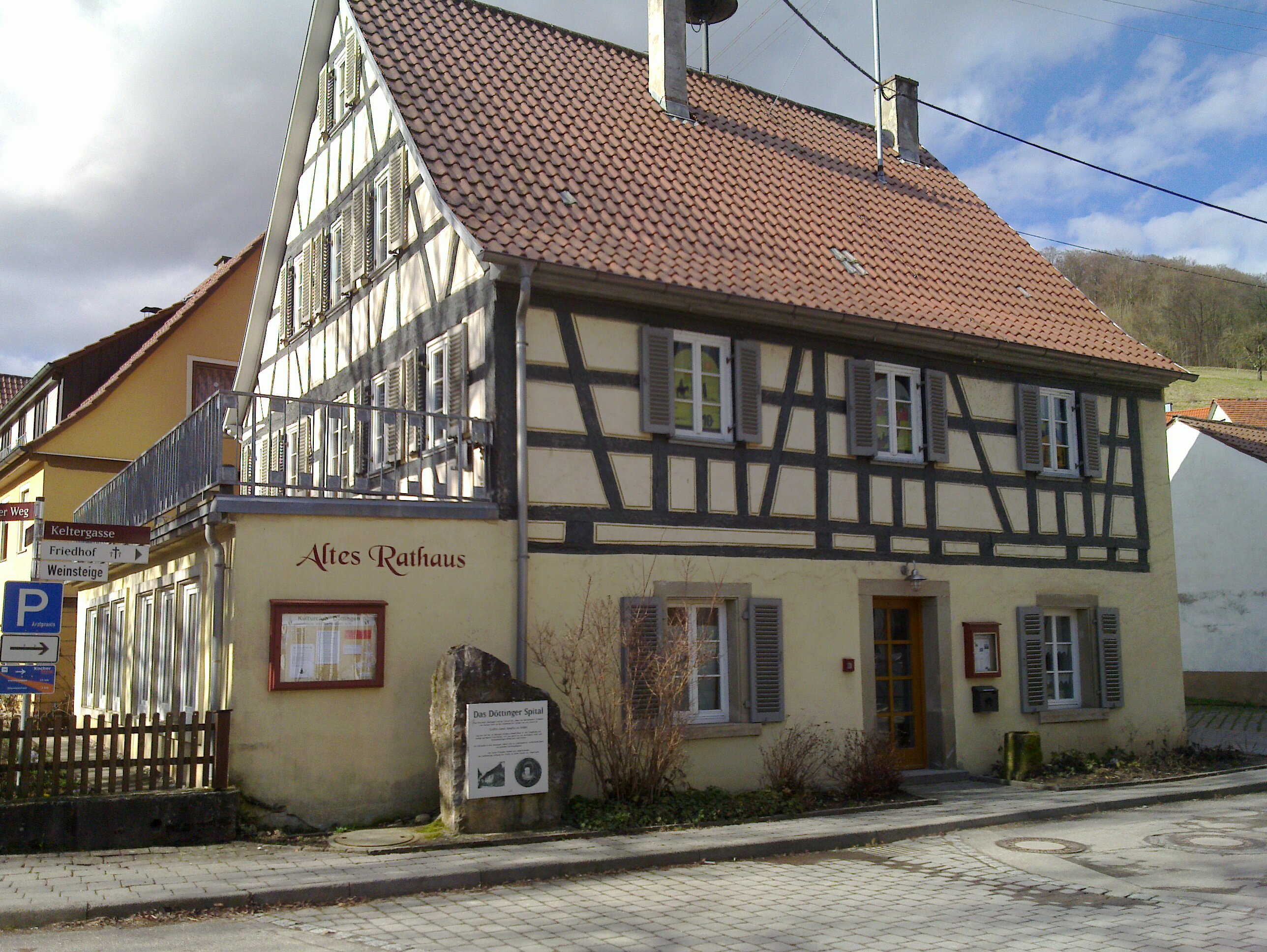 Altes Rathaus Döttingen